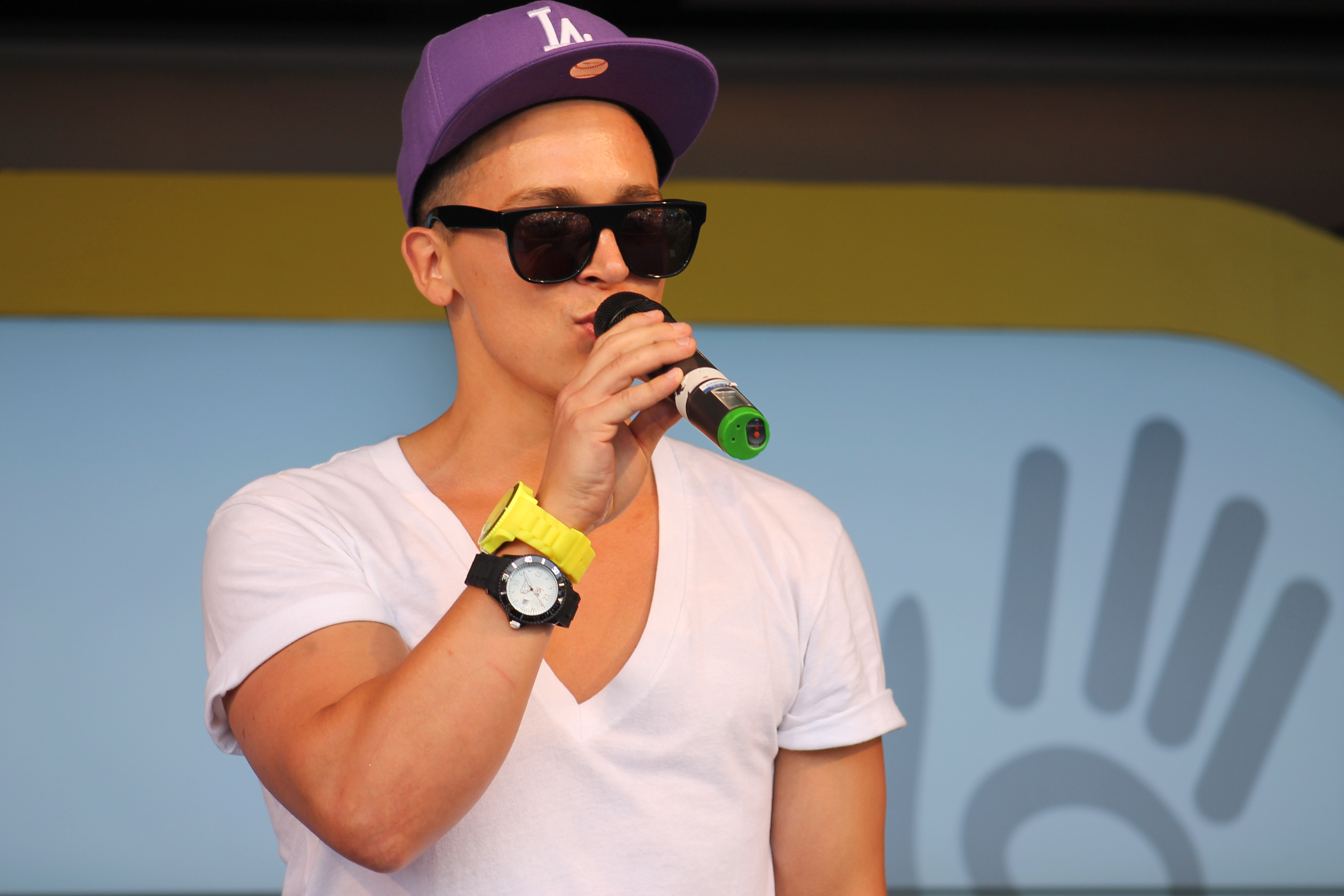 Oliver Kobs bei einem Konzert der Super RTL Toggo Tour